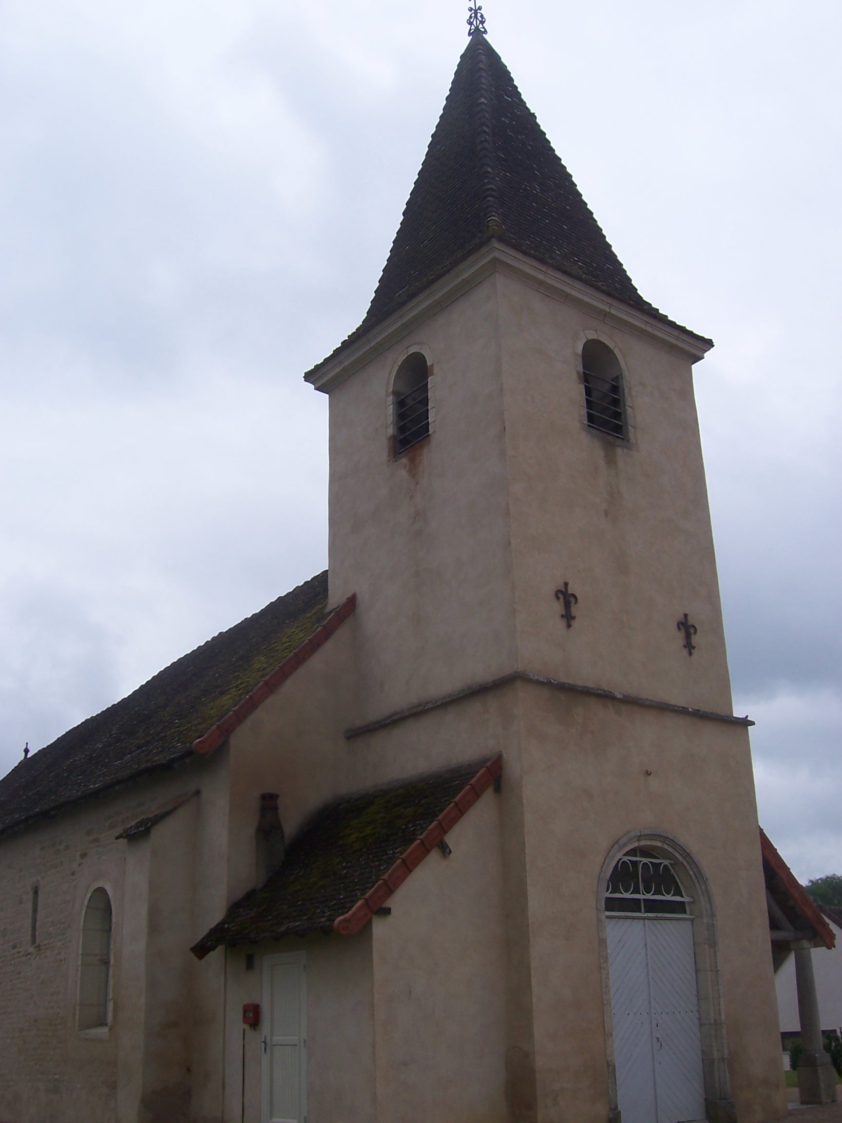 Eglise de La Charmée